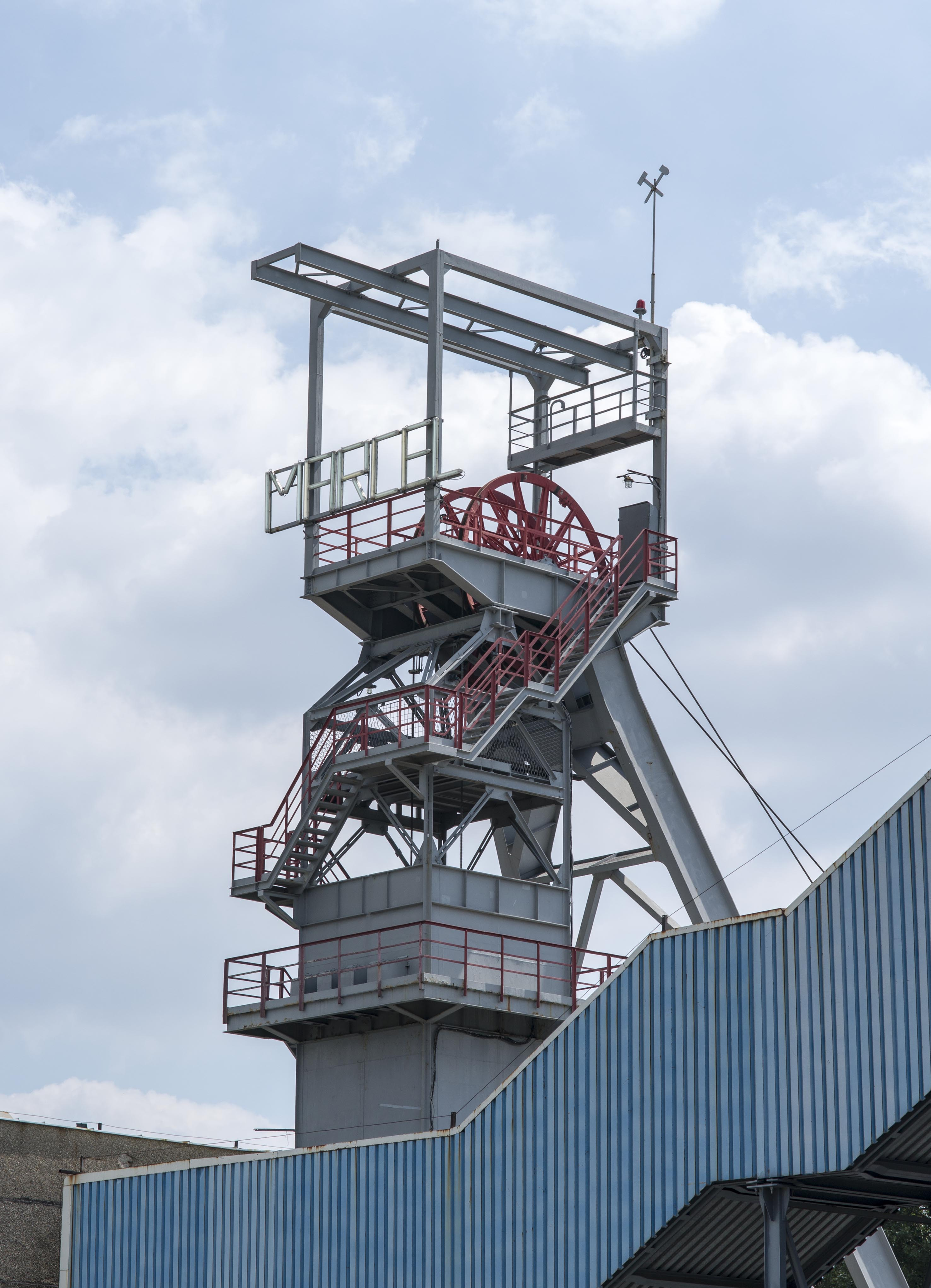 Schacht Marcel in Radlin, Schlesien